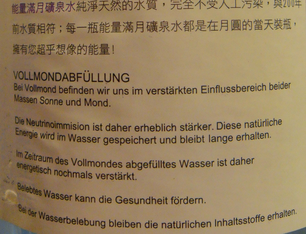 Wasser aus Österreich in Taipei im Angeebot. 1l bei Vollmond abgefülltes wasser kostet 299 Taiwan-Dollar, ohne Vollmond abgefüllt kostet es nur 99 Taiwan-Dollar.